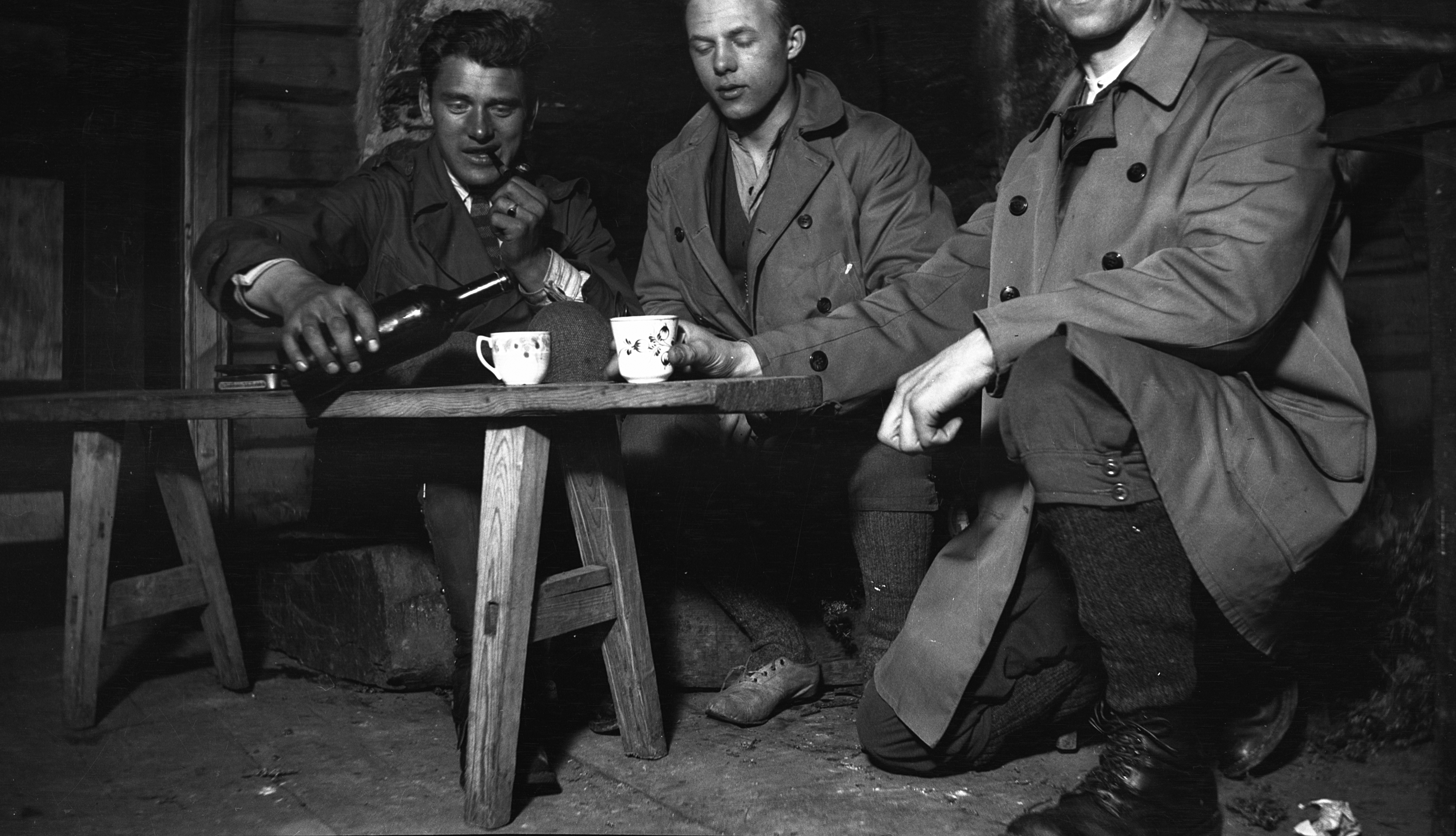 Påsken 1921 "En glad aften" / "A happy evening", 1921. (Easter) Identifier: SFFf-100585.271315 Photographer: Kristian Berge. Medium: Cellulose nitrate negative. Extent: 7 x 12 cm. Original caption (from Berge's negative album): Påsken 1921 "En glad aften".